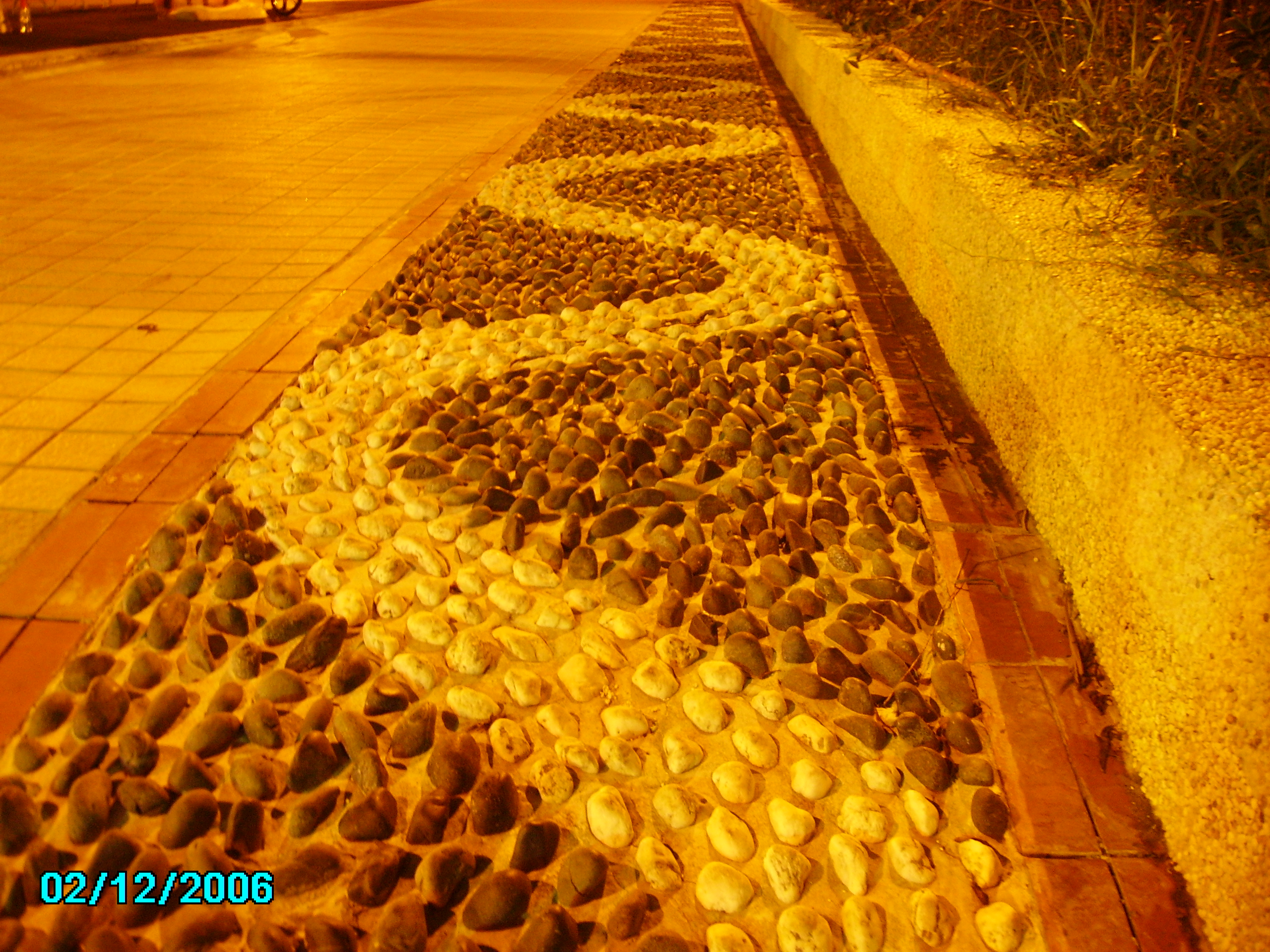 Benign_paseo in Taiwan Zh:健康步道